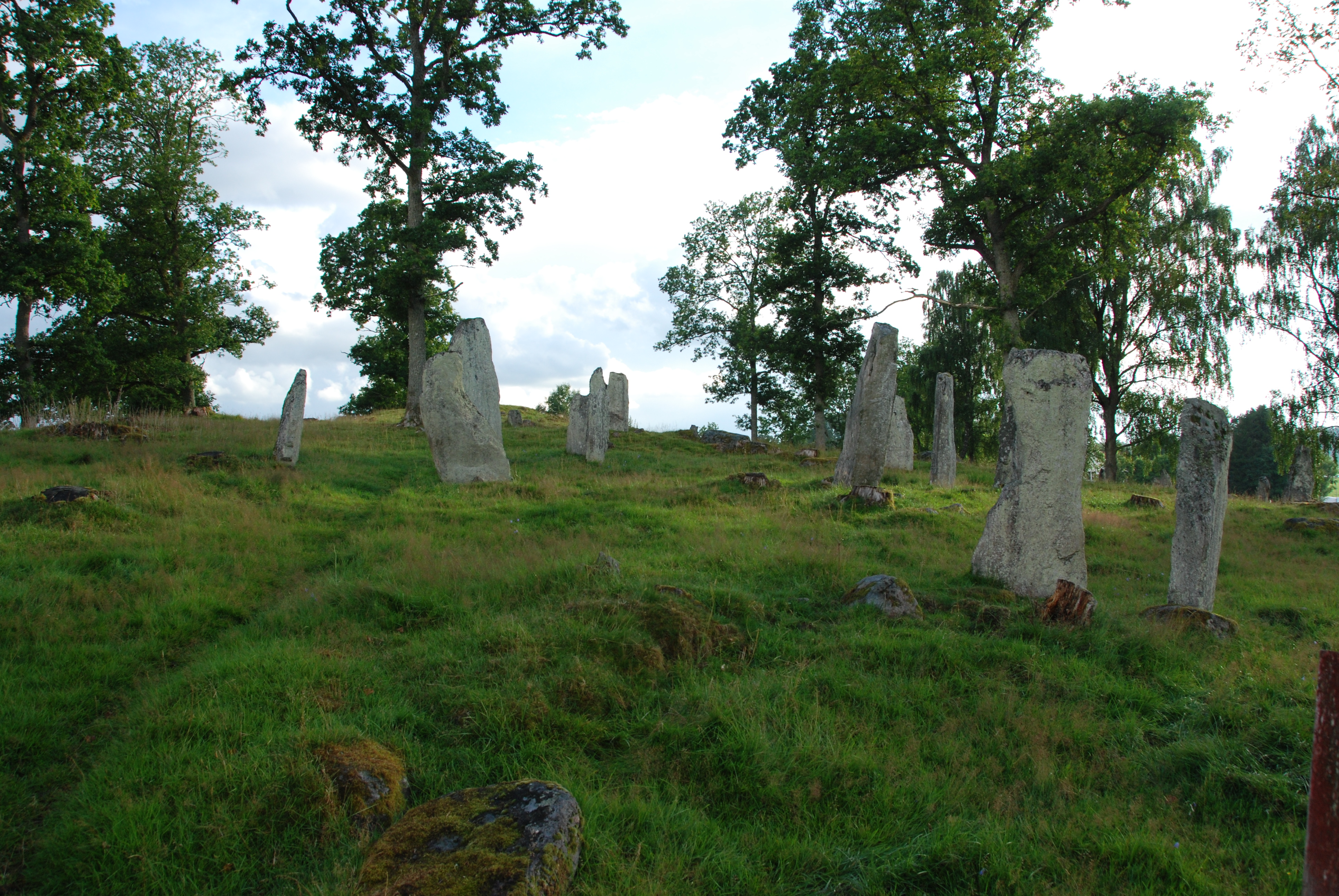 Lundskullen (Södra Härene 6:1)